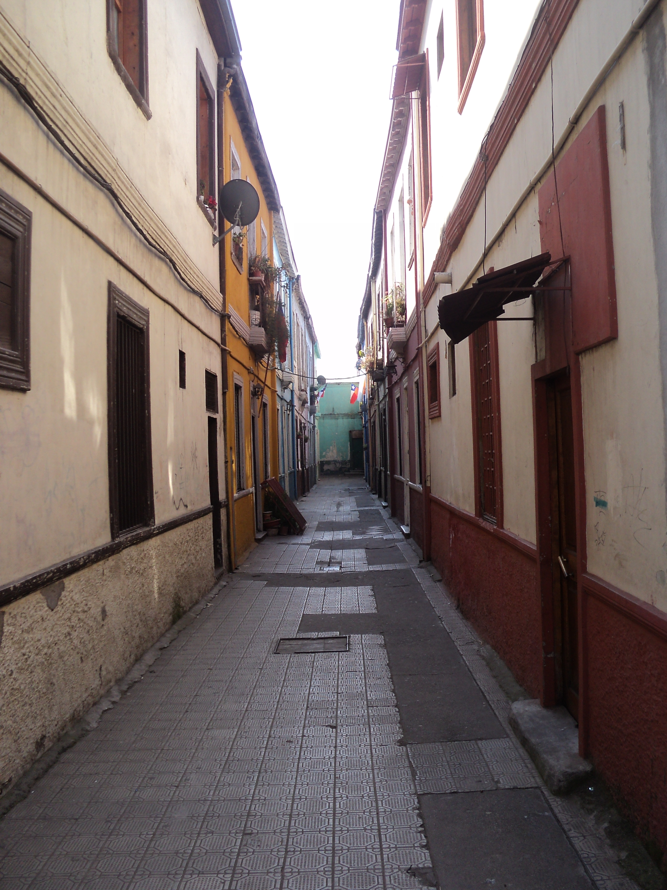 Lucrecia Valdés, Adriana Cousiño, Hurtado Rodríguez y calles aledañas. This is a photo of a national monument in Chile: 892